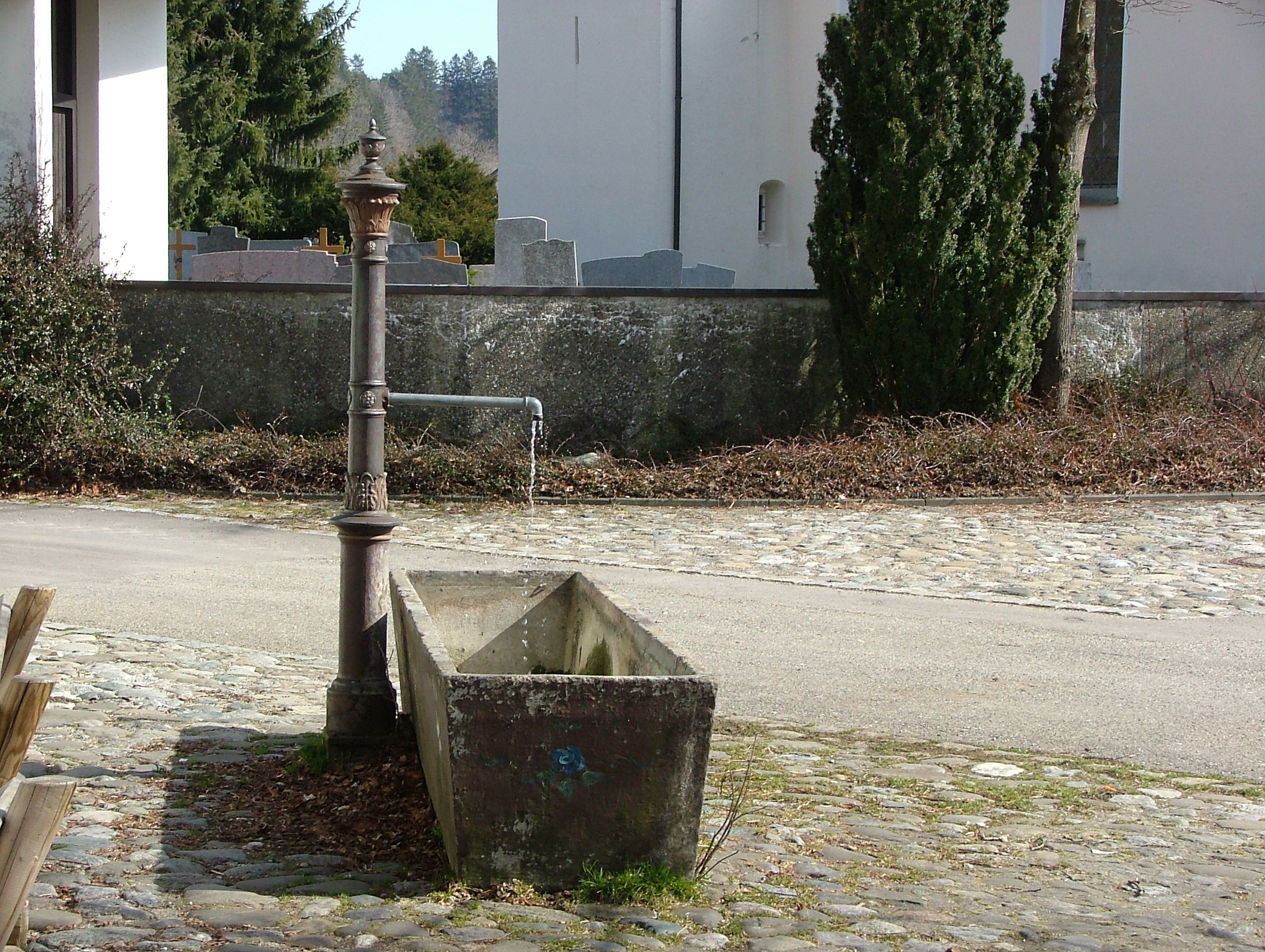 Hinznang